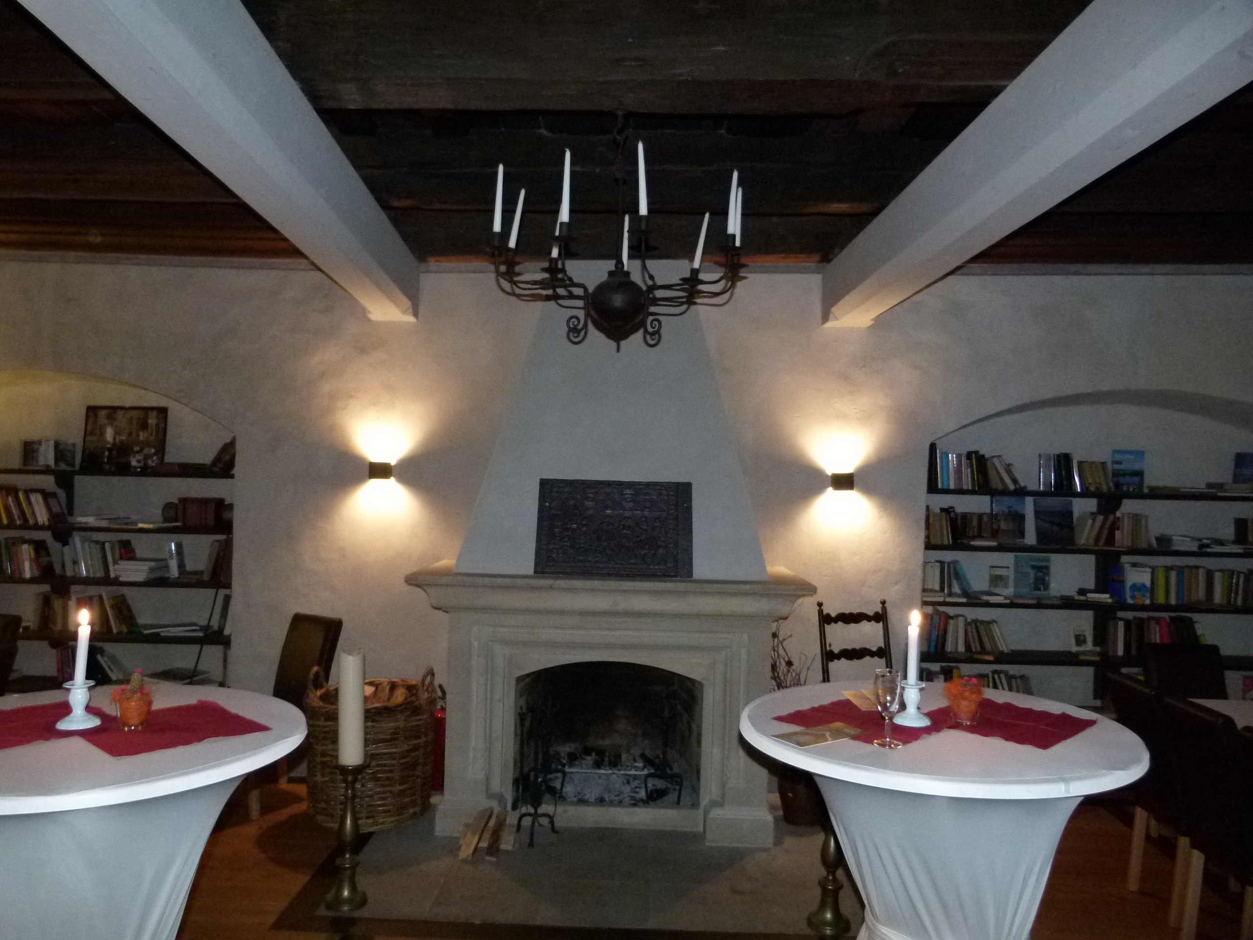 Innenansicht, Peter-Ulrich-Haus, Am Markt 3, Pirna